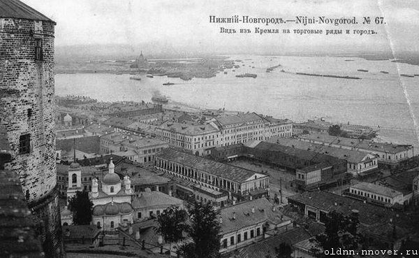 Вид на Стрелку и Рождественскую улицу от Часовой башни Кремля